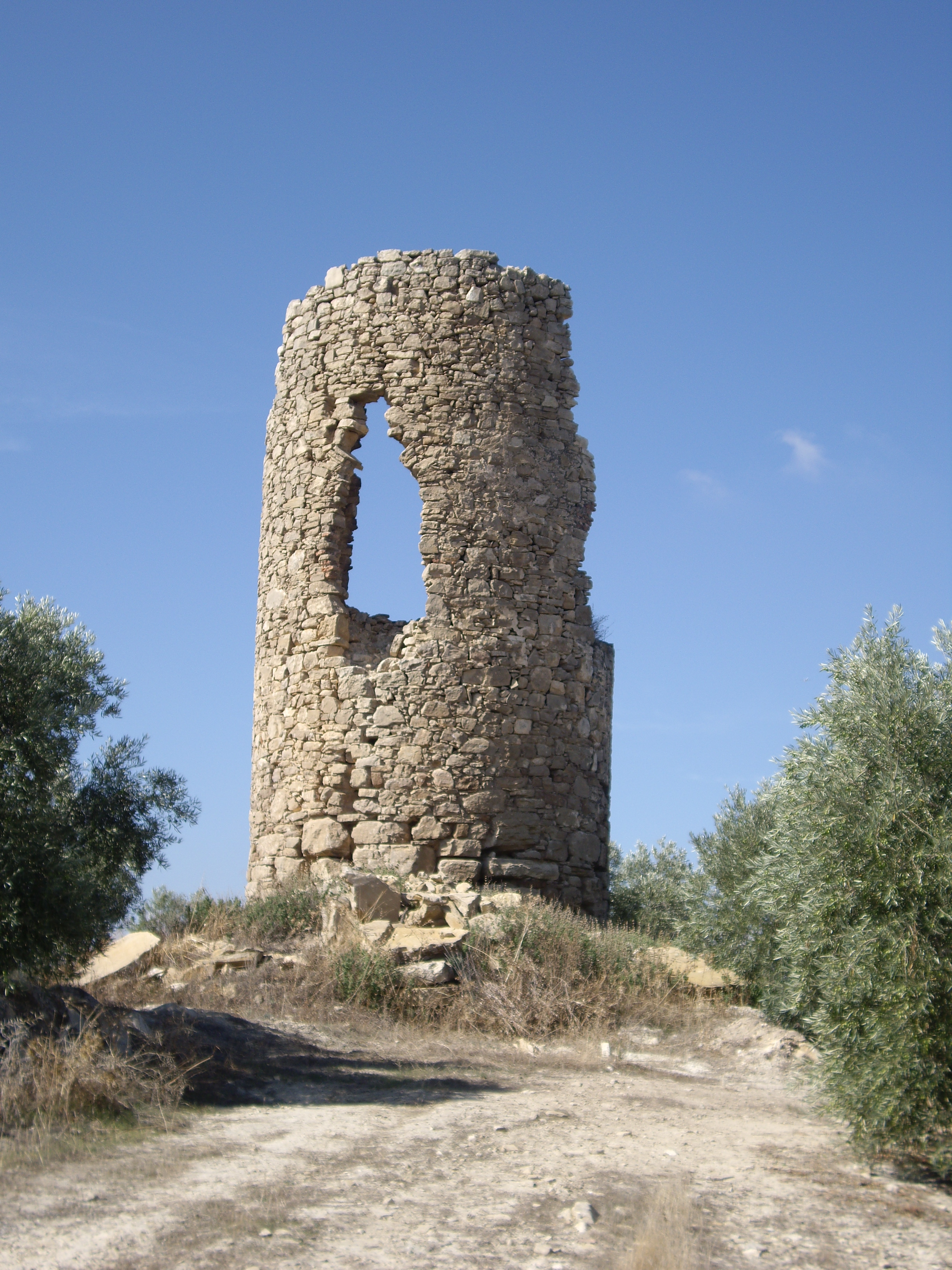 La Torrecilla, Torre de Almenara Medieval, Teba - Málaga - España